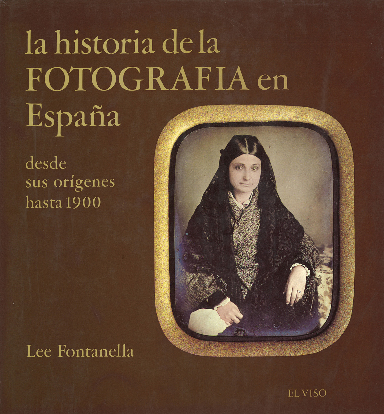 Portada del libro Historia de la Fotografía en España de Lee Fontanella